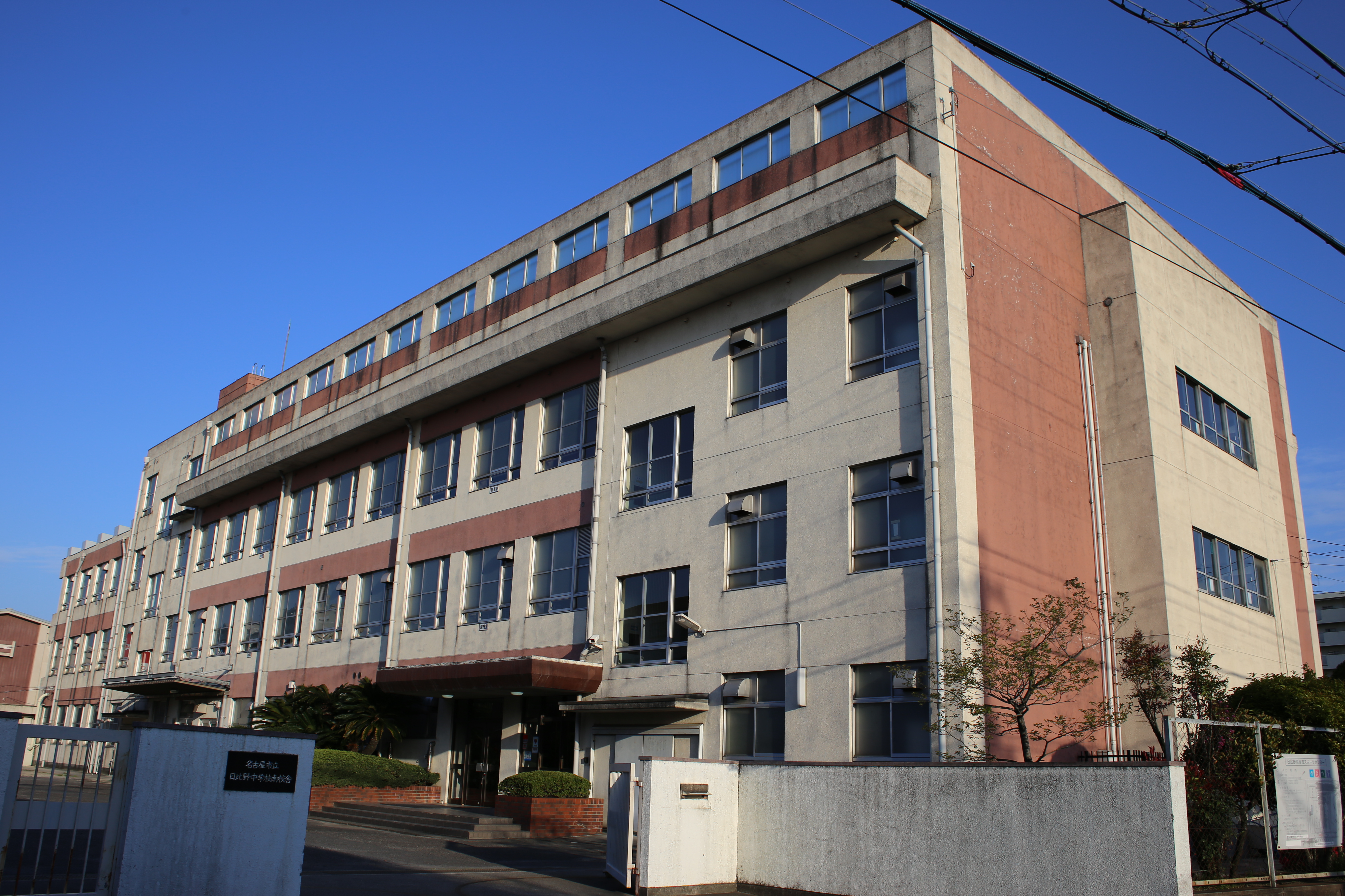 名古屋市熱田区一番三丁目の名古屋市立日比野中学校南校舎を西側公道北側より撮影